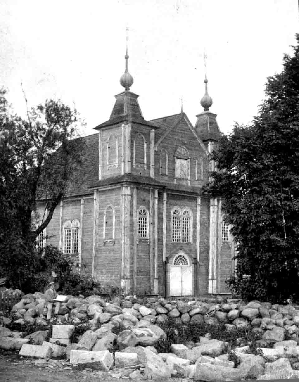 Беларуская (тарашкевіца): Мсьцібаў (Mścibaŭ), стары касьцёл